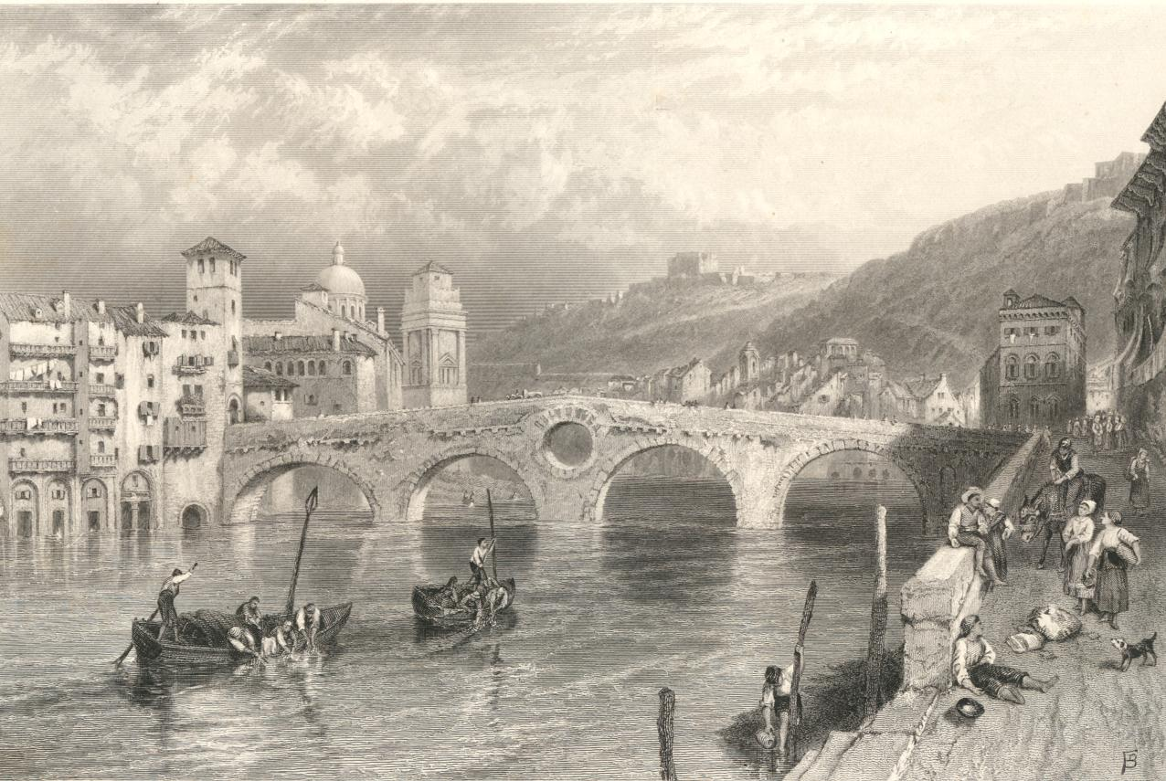 Ponte di Pietra a Verona in un'incisione di J. Godfrey